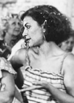 María Fiorentino, en una escena de la película Chechechela, una chica de barrio (1986).